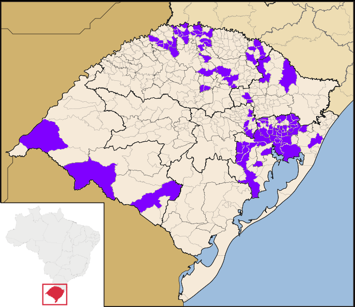 Mapa com as cidades nas quais o movimento CLJ está implantado.